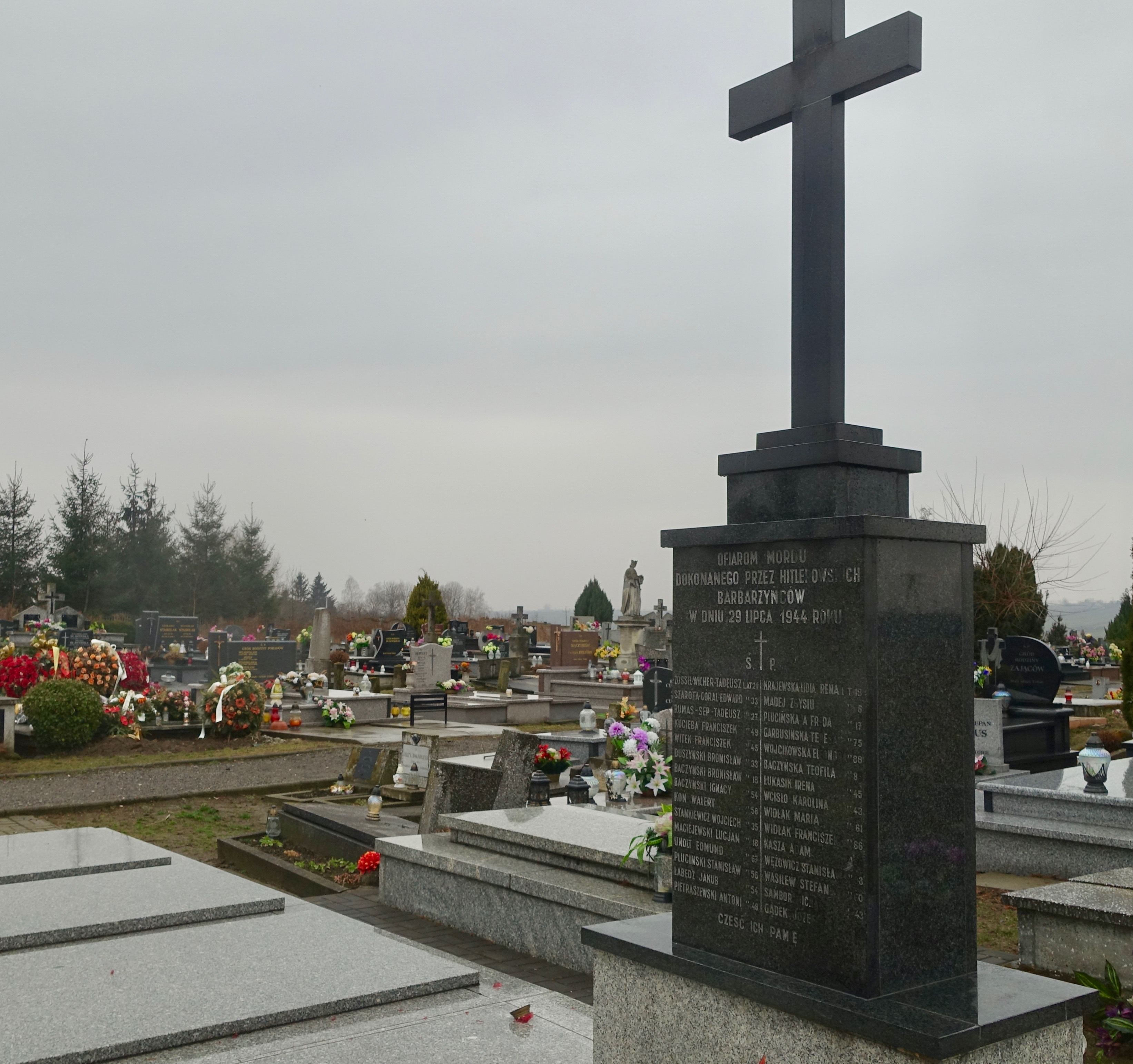 grób polskich ofiar zbrodni dokonanej przez ukraińskich Własowców (w służbie Niemców) w Opatowcu 29 lipca 1944